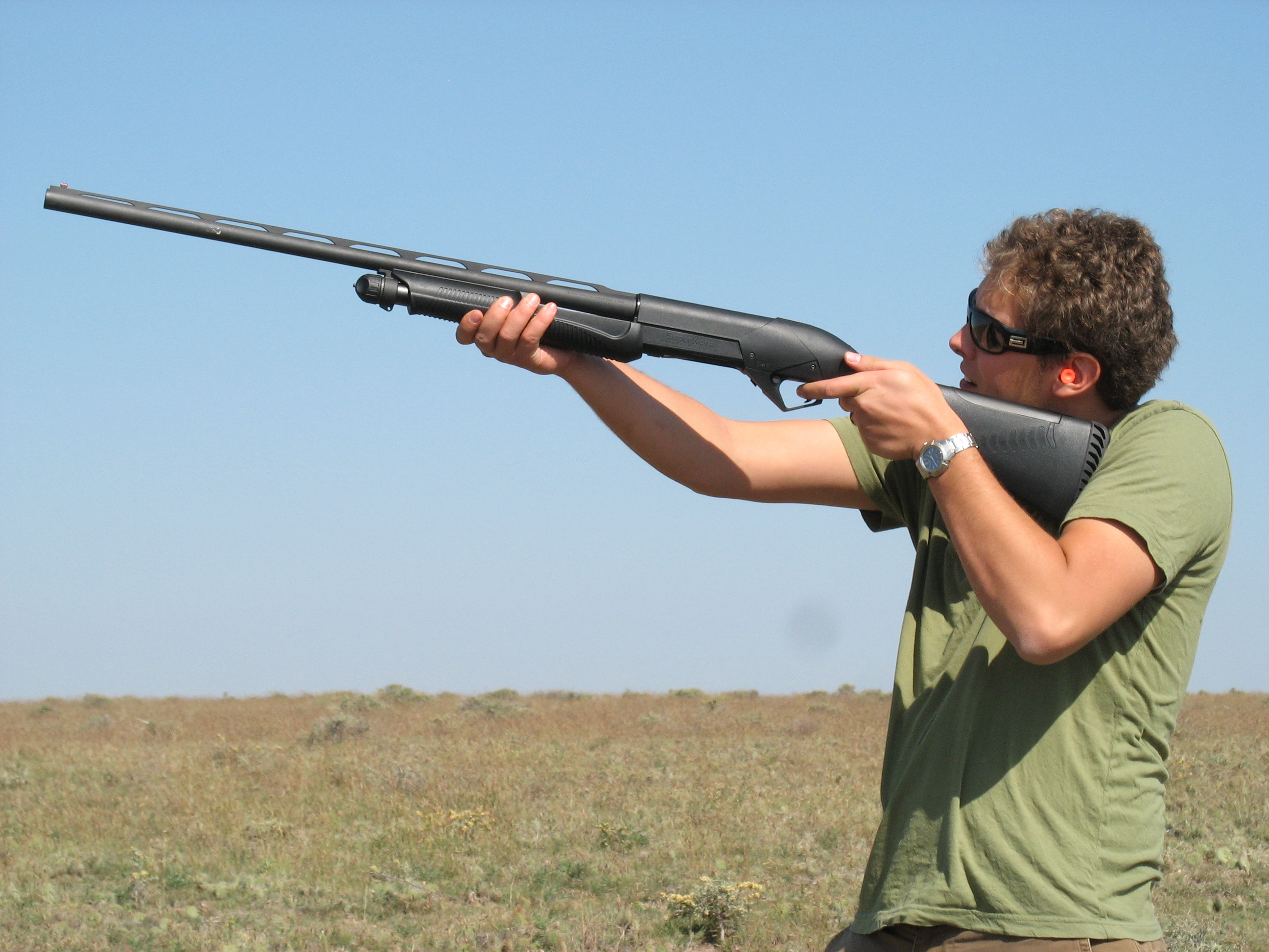 Tir du fusil de chasse à pompe Benelli Super Nova